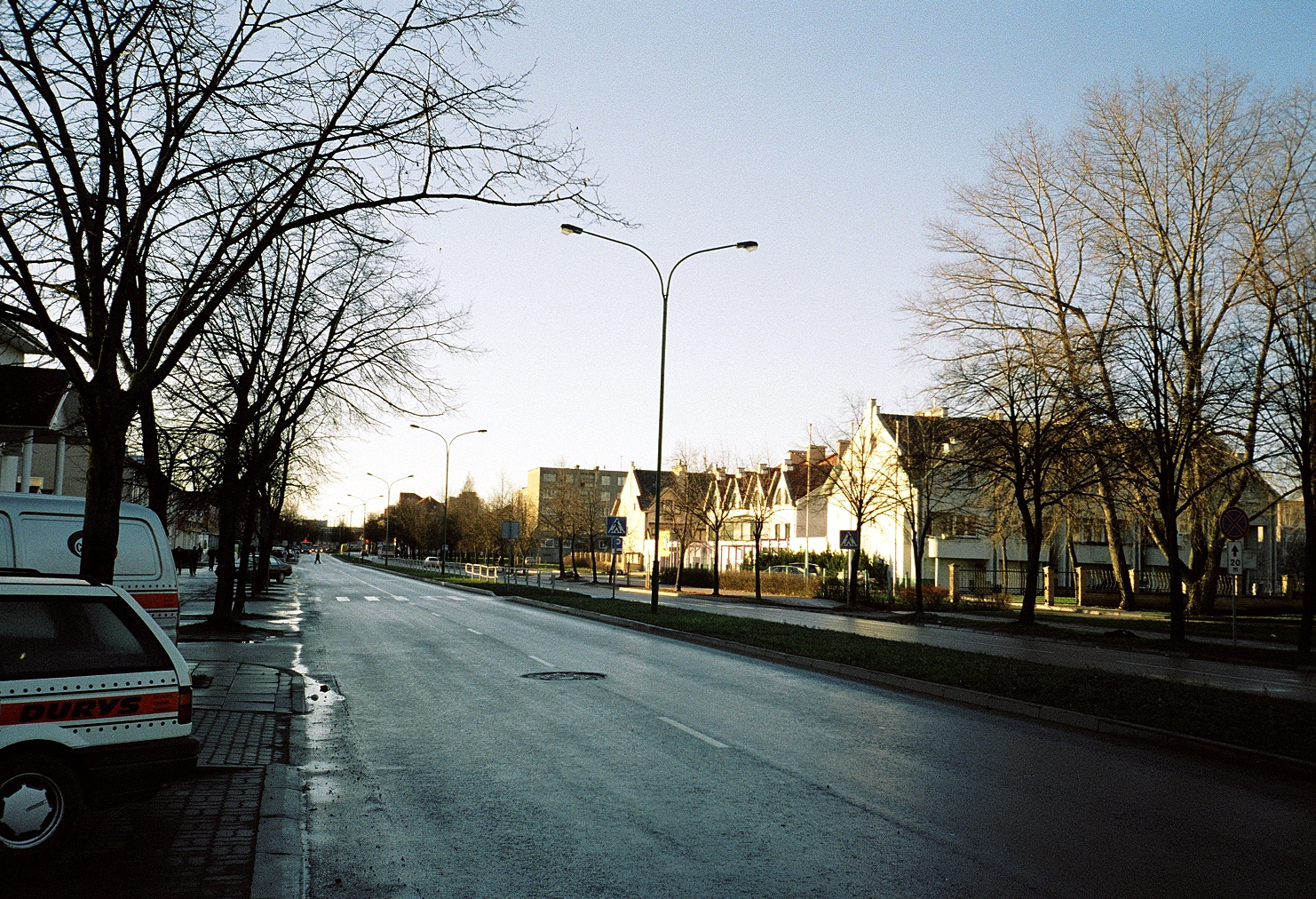 Naikupės gatvė / Naikupės street, Klaipėda